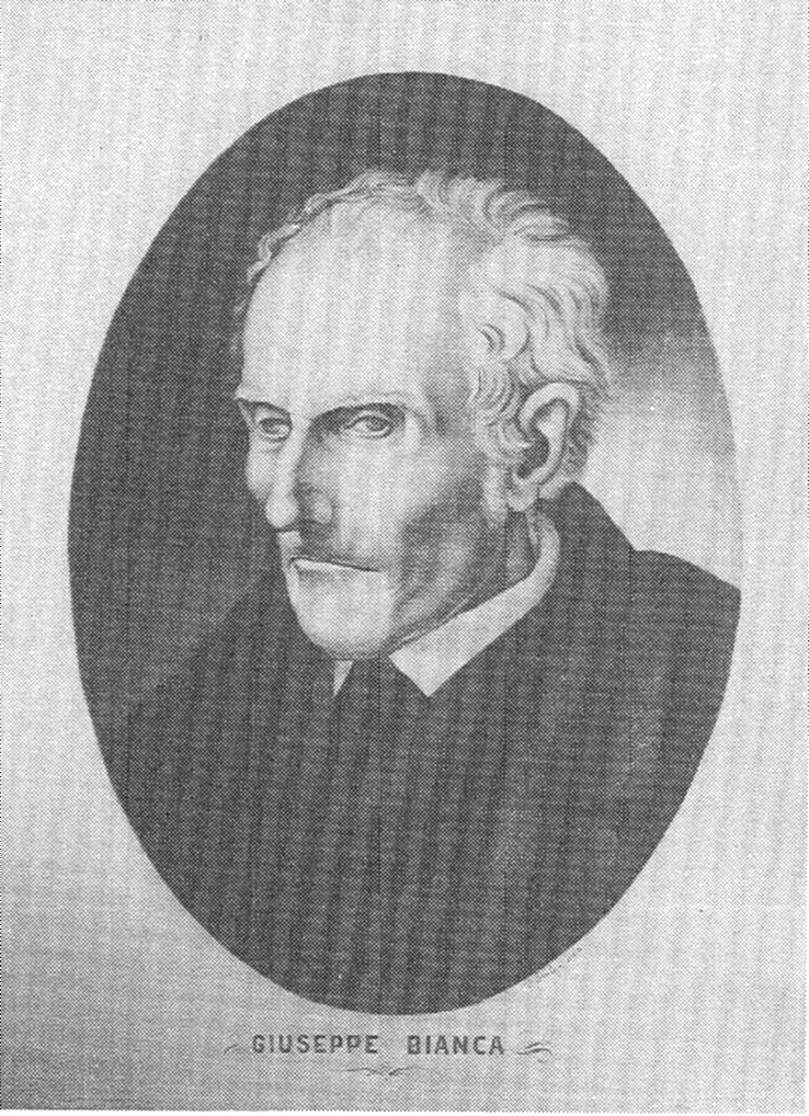 Giuseppe Bianca